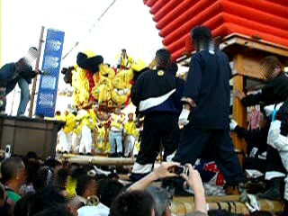 平成19年新居浜太鼓祭り-鉢合わせ